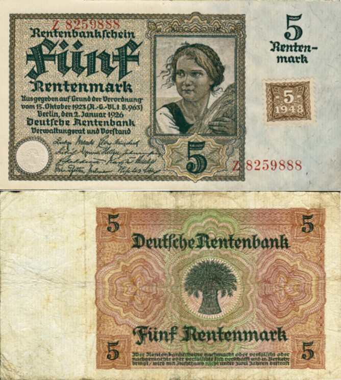 5 Rentenmark mit Klebemarke der SBZ 1948